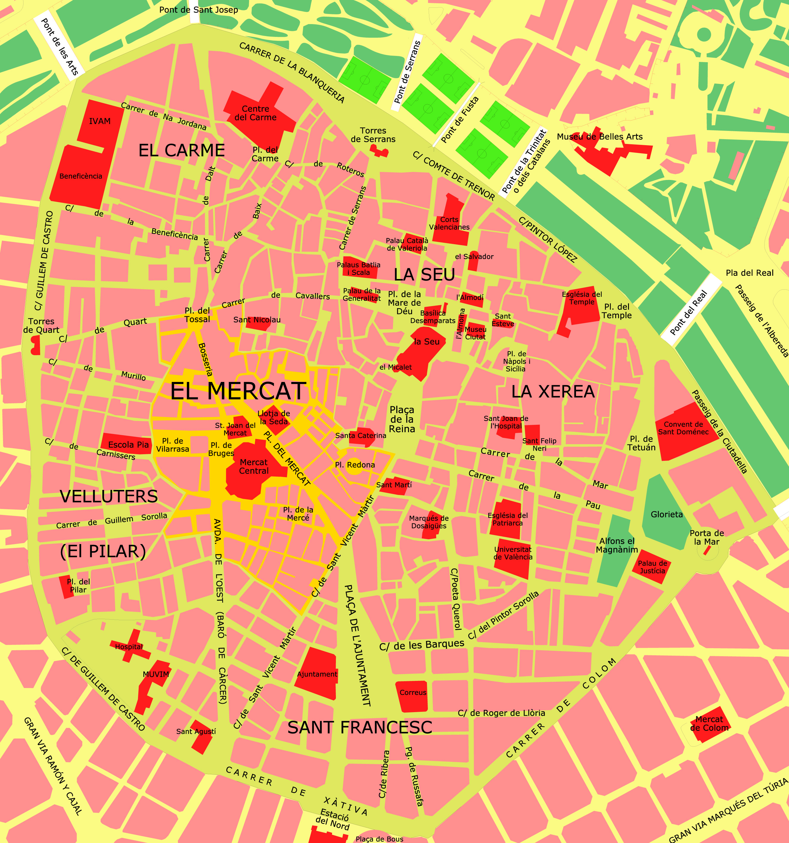 Barri del Mercat, districte de Ciutat Vella (València)